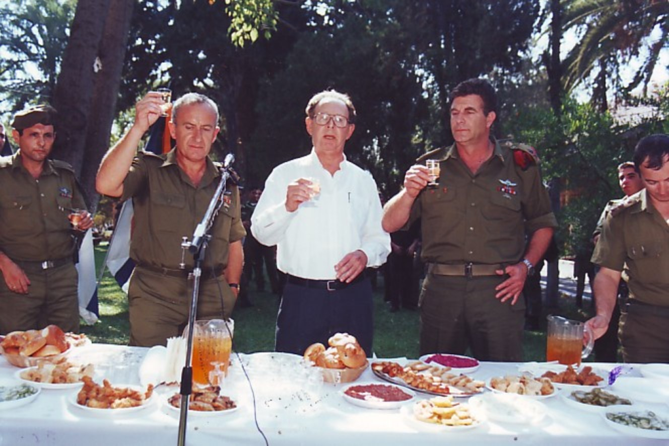 טקס חילופי פיקוד בפיקוד העורף. המפקד היוצא זאב ליבנה (משמאל), סגן שר הביטחון מרדכי גור (במרכז) ושמואל (שמוליק) ארד (מימין) המפקד שנכנס בטקס החילופים.